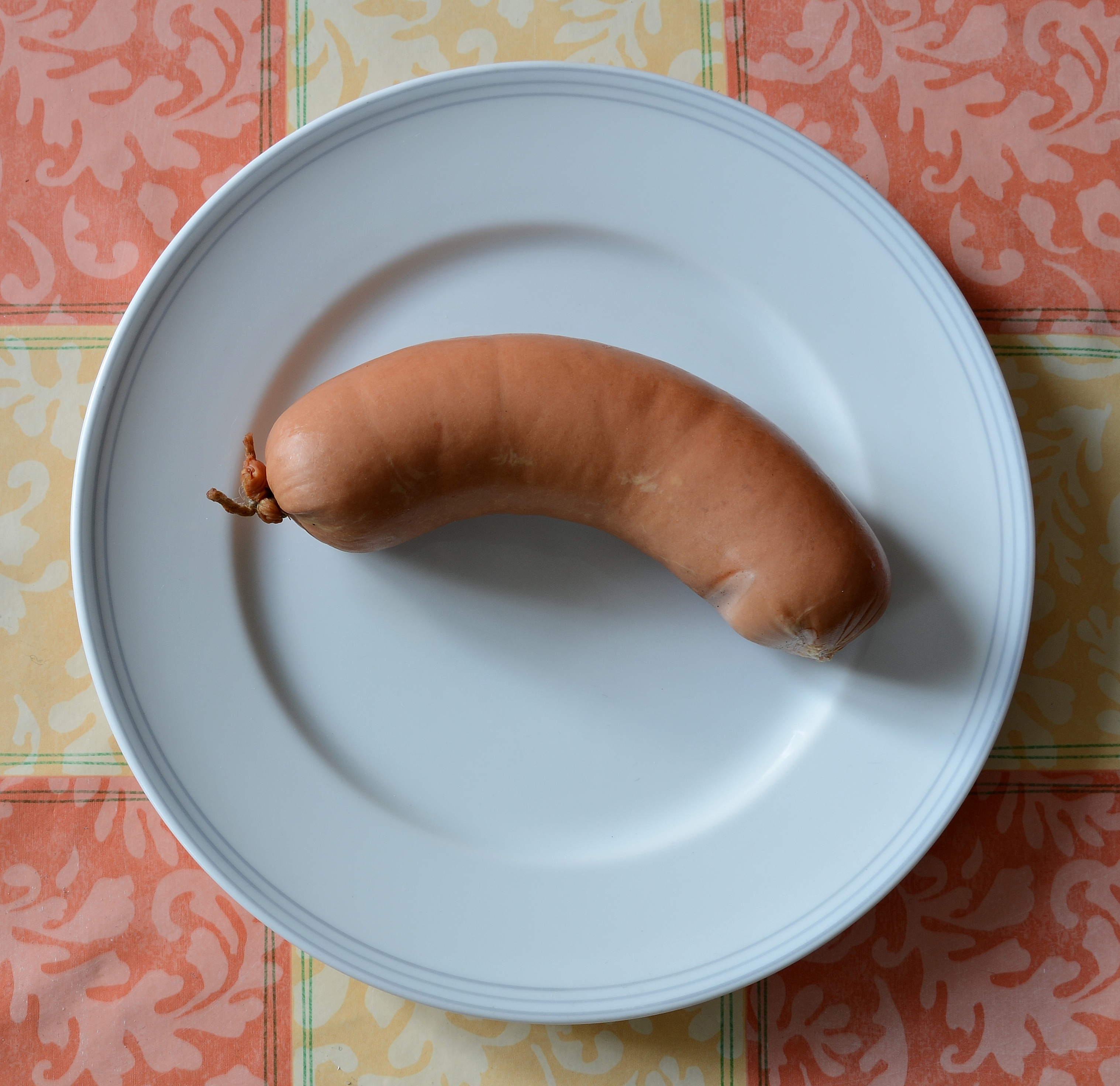 Knackwurst vulgo Beamtenforelle